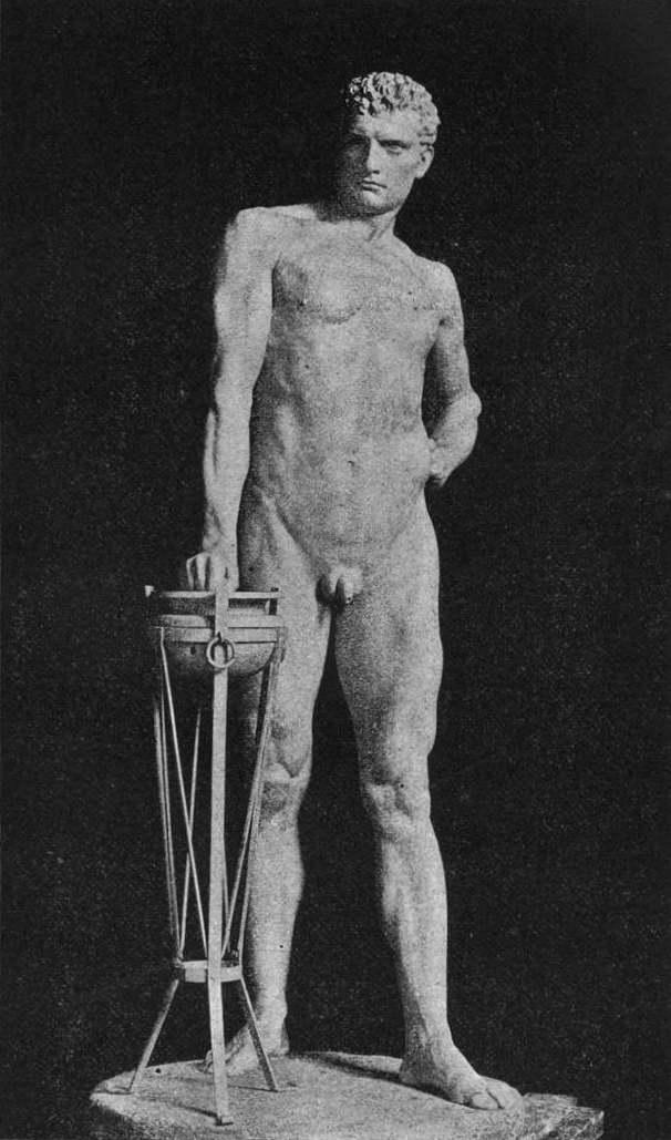 Mucius Scävola, Gipsfigur